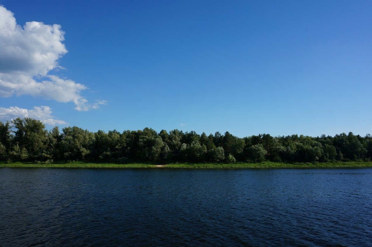 Побережье полуострова Копылово